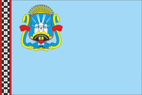 Прапор Олександрівська